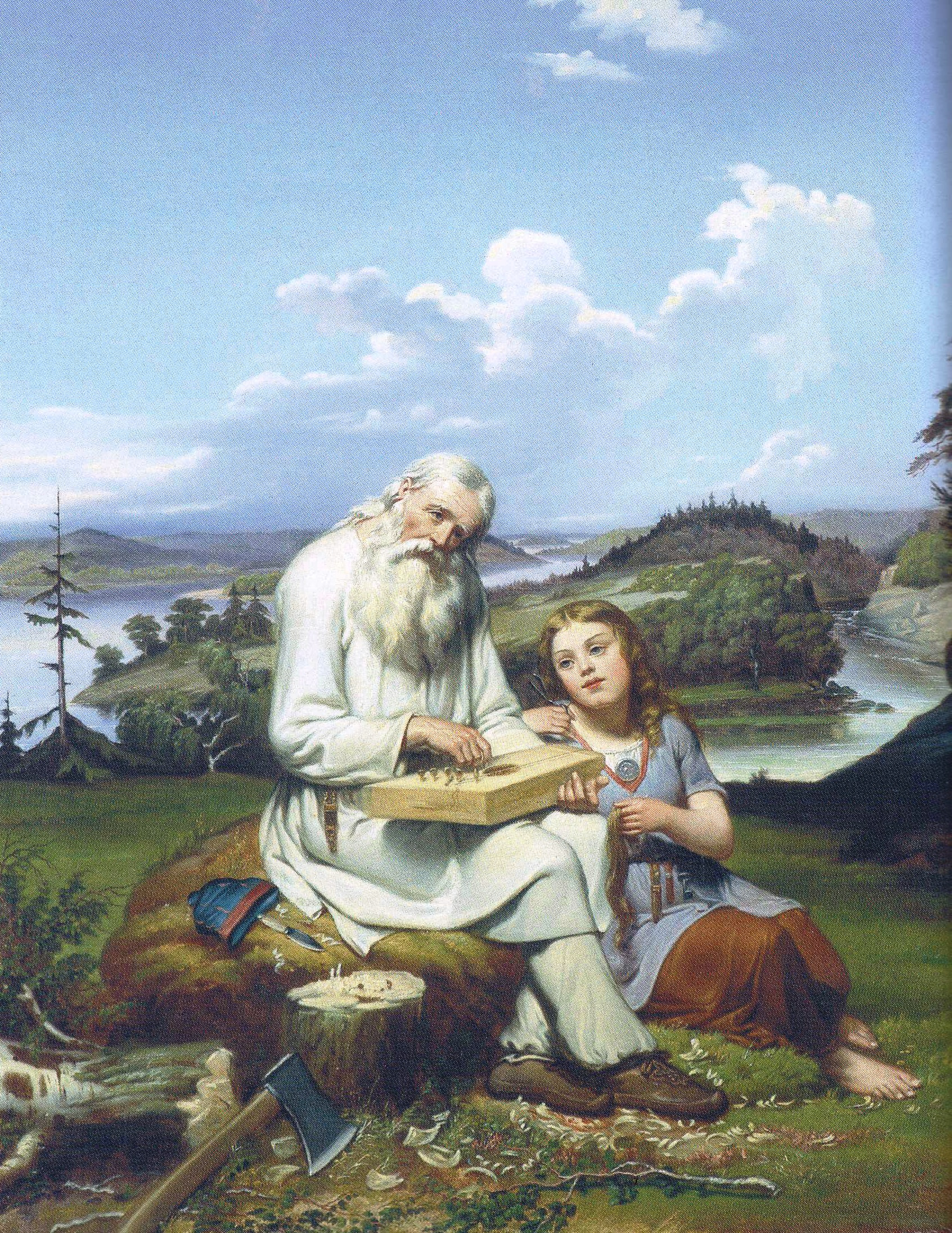 Väinämöinen kiinnittää kielet kanteleeseen on ensimmäinen maalaus Väinämöisestä. Maalauksen omistaa Kalevalaseura.